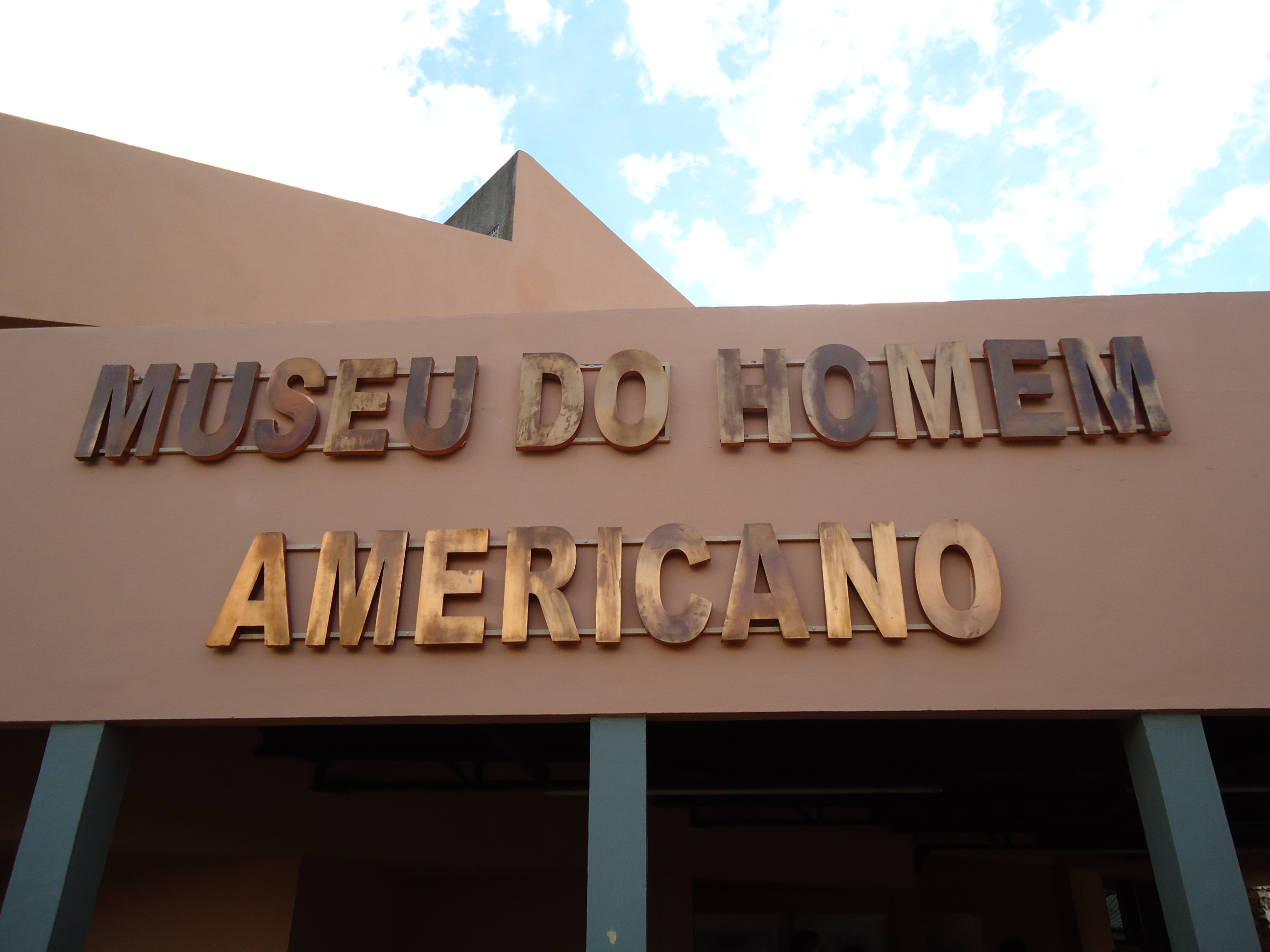 visita ao museu (um dos melhores museus do Brasil)